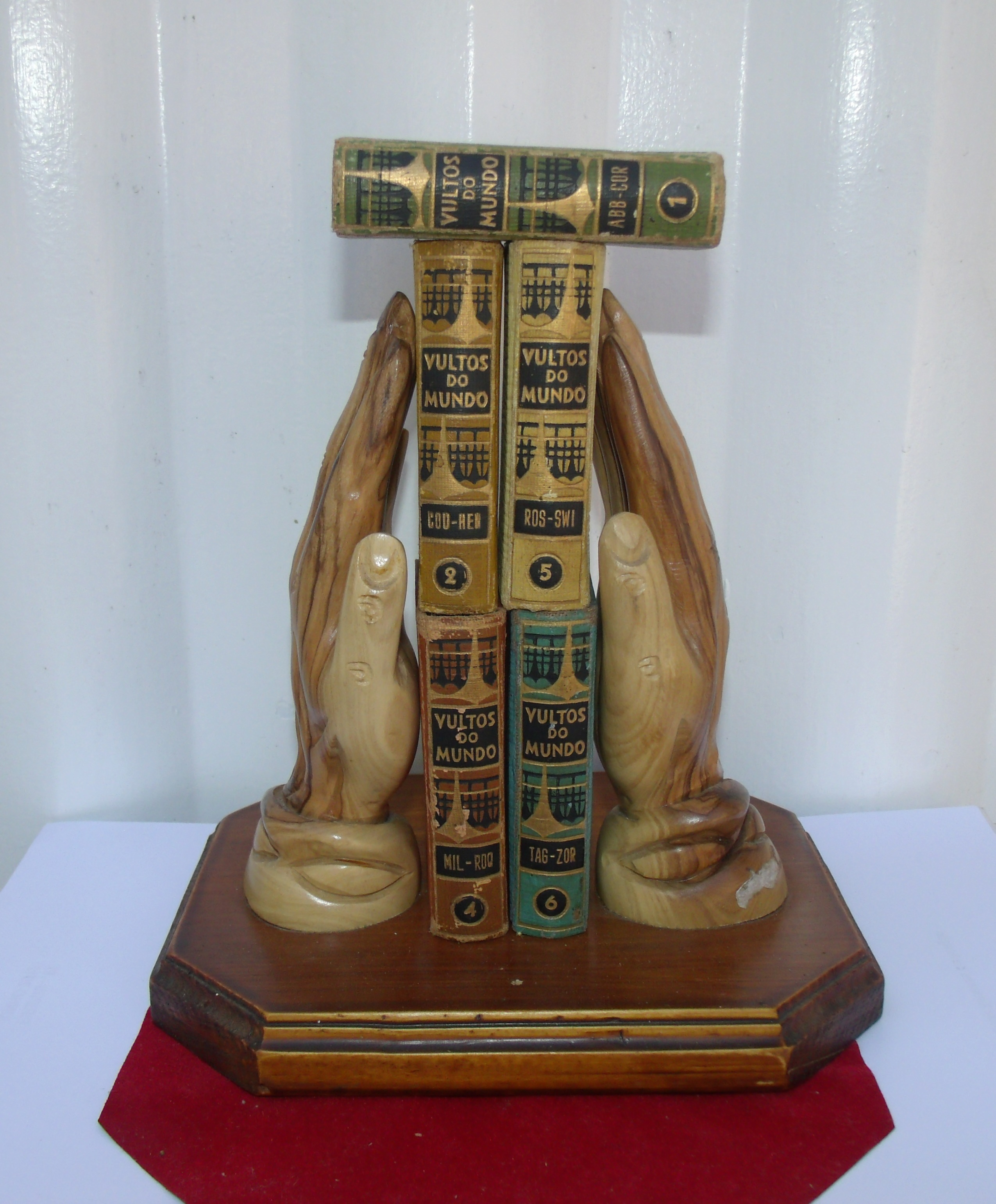 Mão em madeira artesanal com a coleção Vultos do Mundo de Guarany Gallo com traços de Oscar Niemeyer.